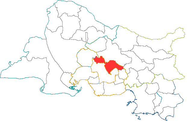 Situation du canton dans le département des Bouches-du-Rhône (France)